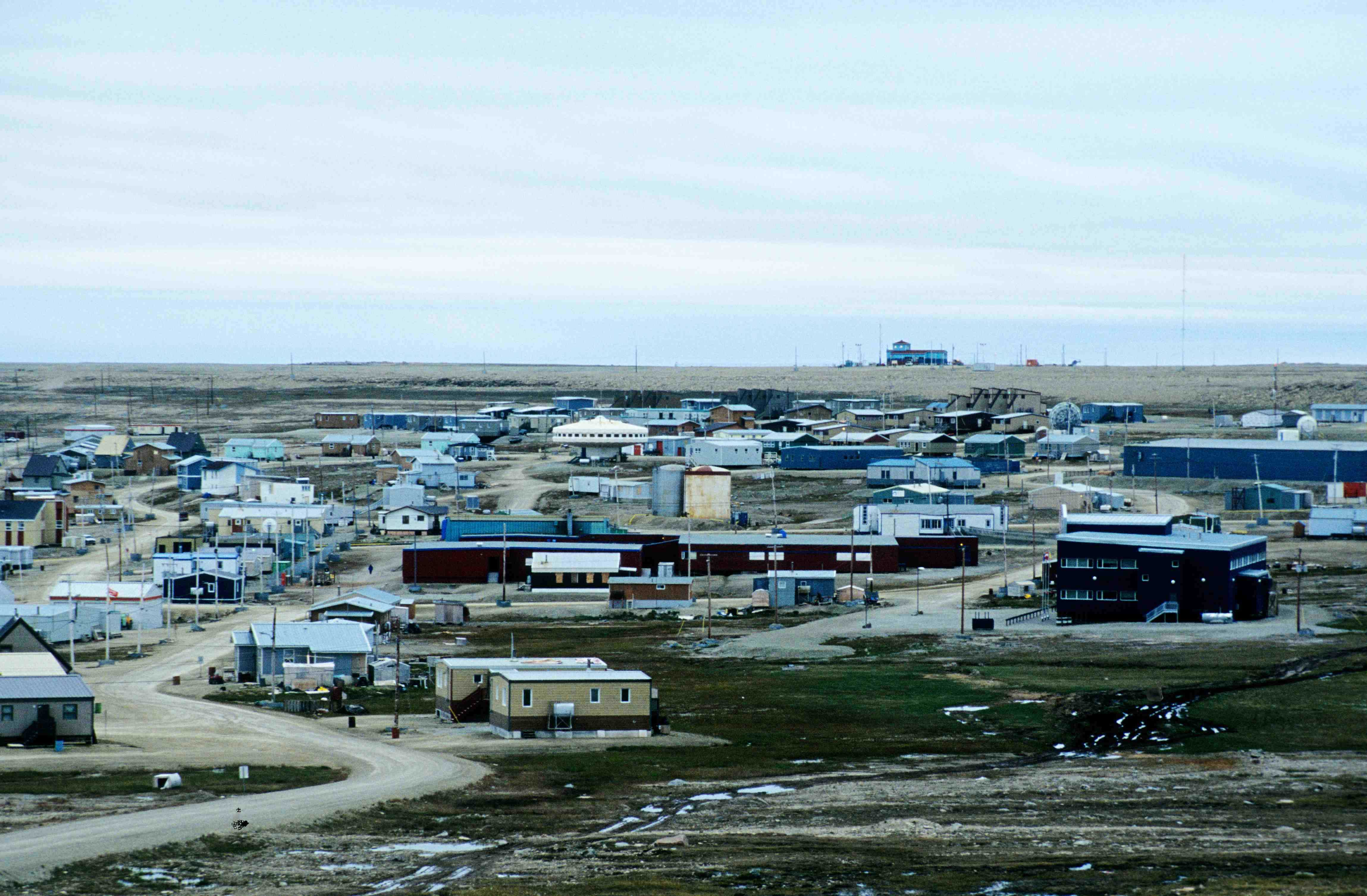 Iglulik (Centre of village)